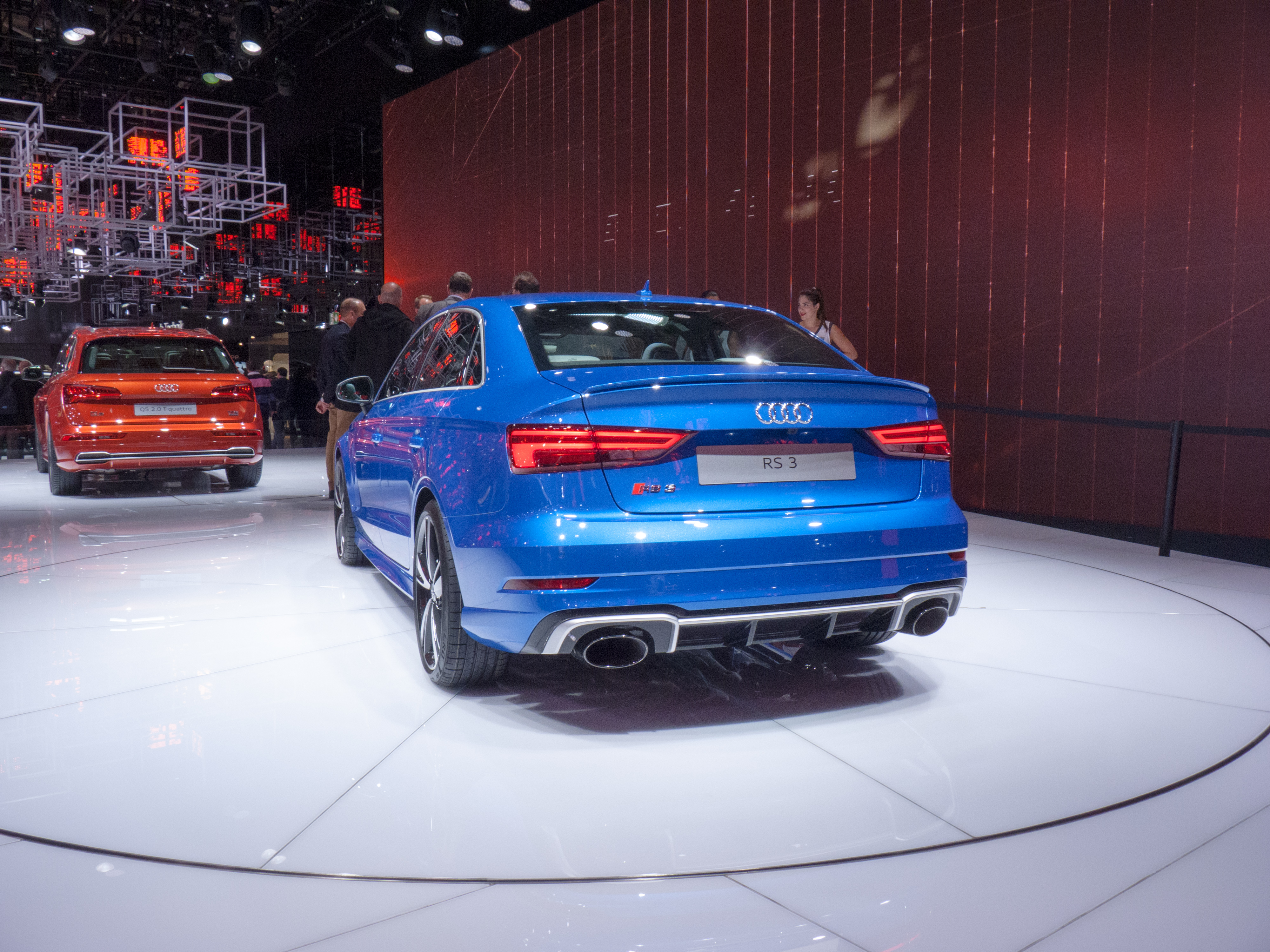 Audi RS3 au Mondial de l'automobile de Paris 2016